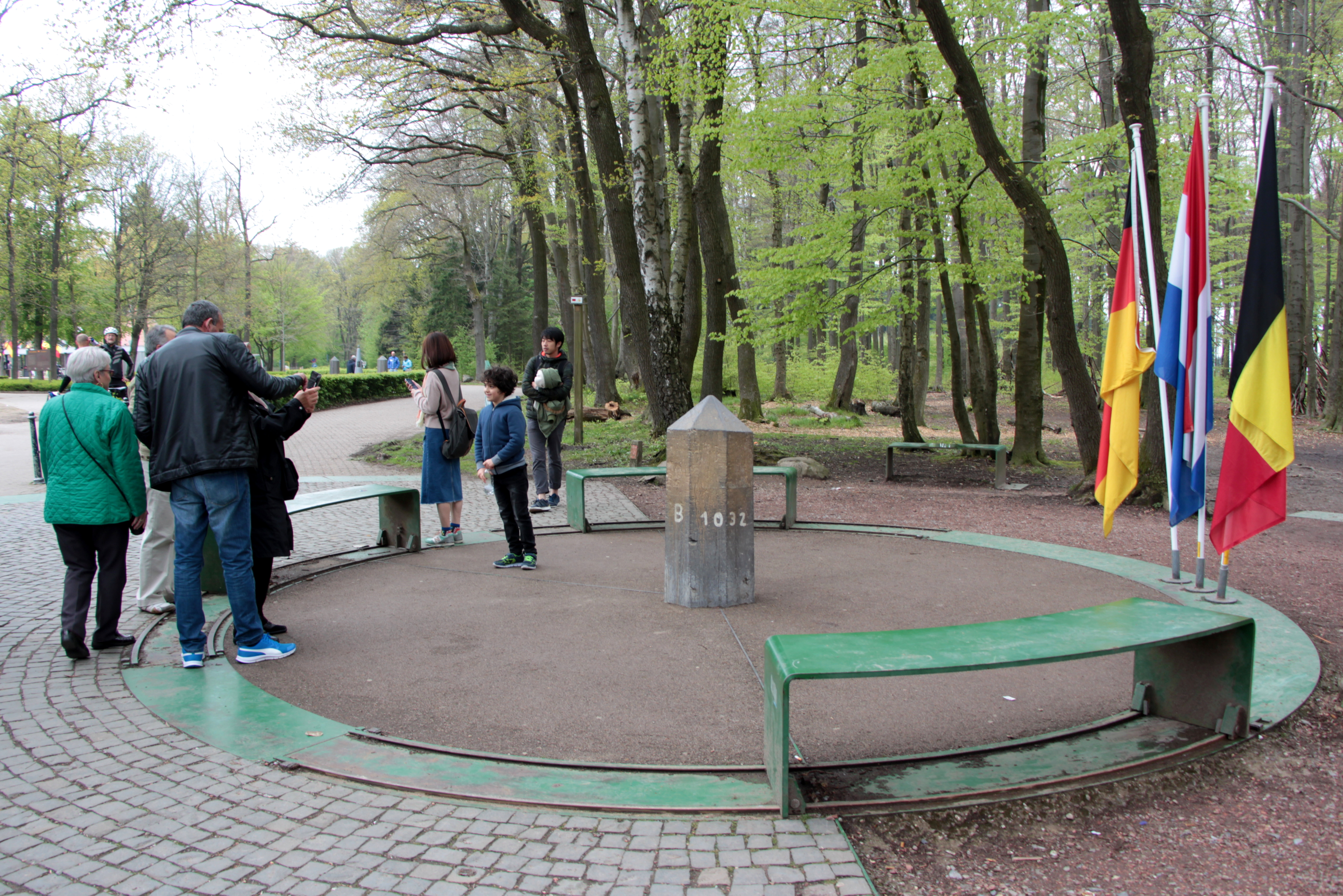 Vaalserberg, im Mai 2018. Dreiländerpunkt (Dreiländereck) mit Flaggen